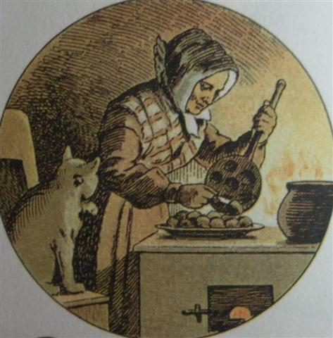 Farvelagt illustration af æbleskiver der vendes ud af en æbleskivepande fra Johan Krohns Peters Jul (første udgave 1866). Illustrationen er skabt af broderen. Den oprindelige udgave fra 1866 var sort/hvid.